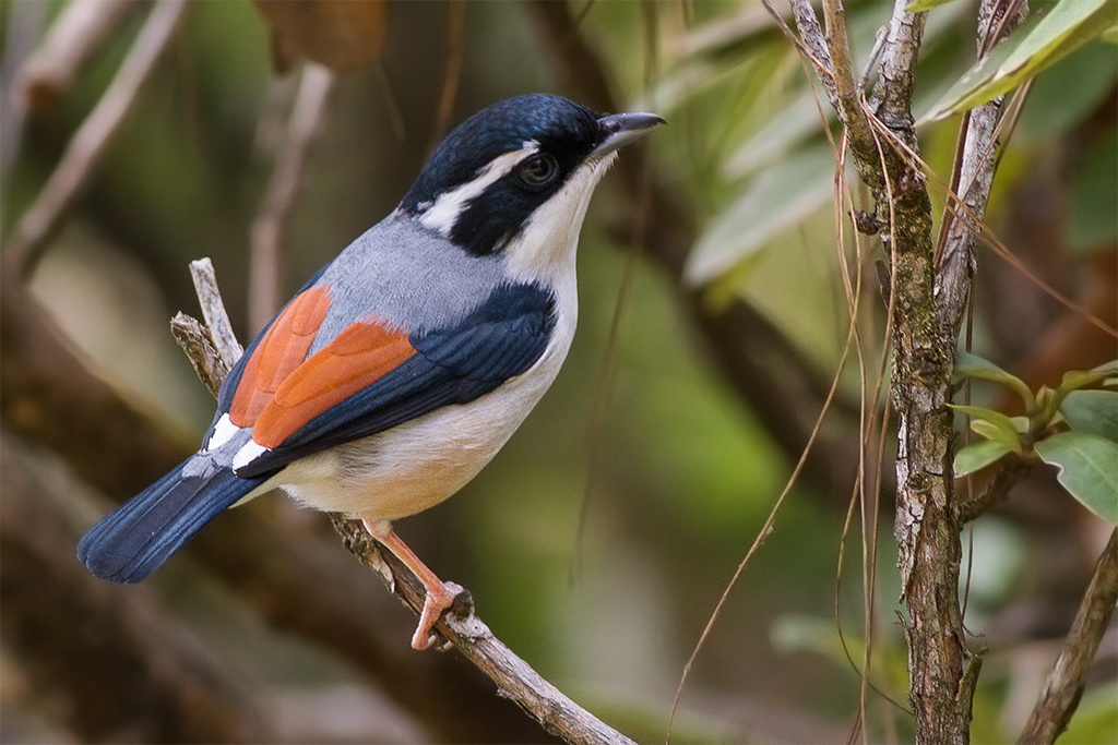 Himalayan Shrike-babbler Pteruthius ripleyi, male; Paharpani, Uttarakhand, India.